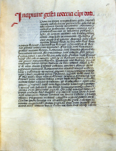 Incipit de la Historia Roderici del Códice S. Manuscrito 9/450 de la Biblioteca de la Real Academia de la Historia, fol. 57rº. En tinta roja: Incipiunt Gesta Roderici Campi Docti